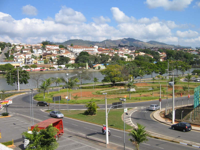 Lagoa Taboão (Lake Taboo} in Bragança Paulista, São Paulo, Brasil.